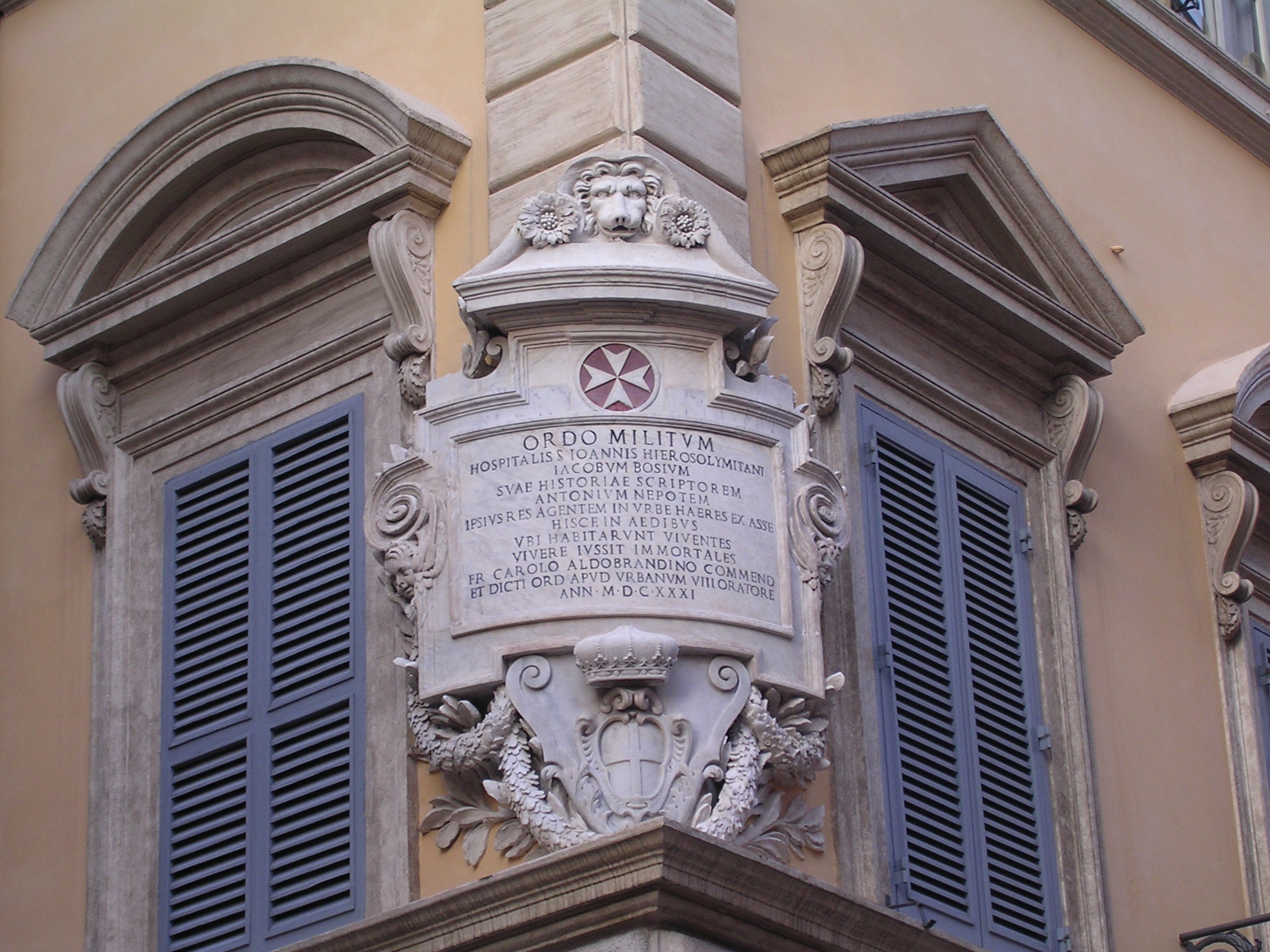 Palazzo di Malta, Via dei Condotti 68 Roma, sede de la Orden Soberana de Malta